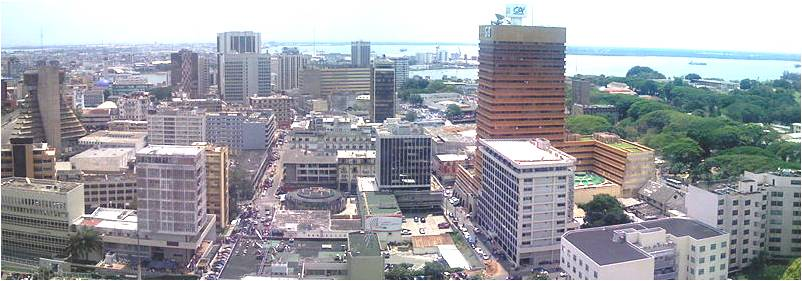 amélioration de Abidjan.jpg